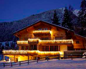 Chalet Eugenia in Klosters, Switzerland.